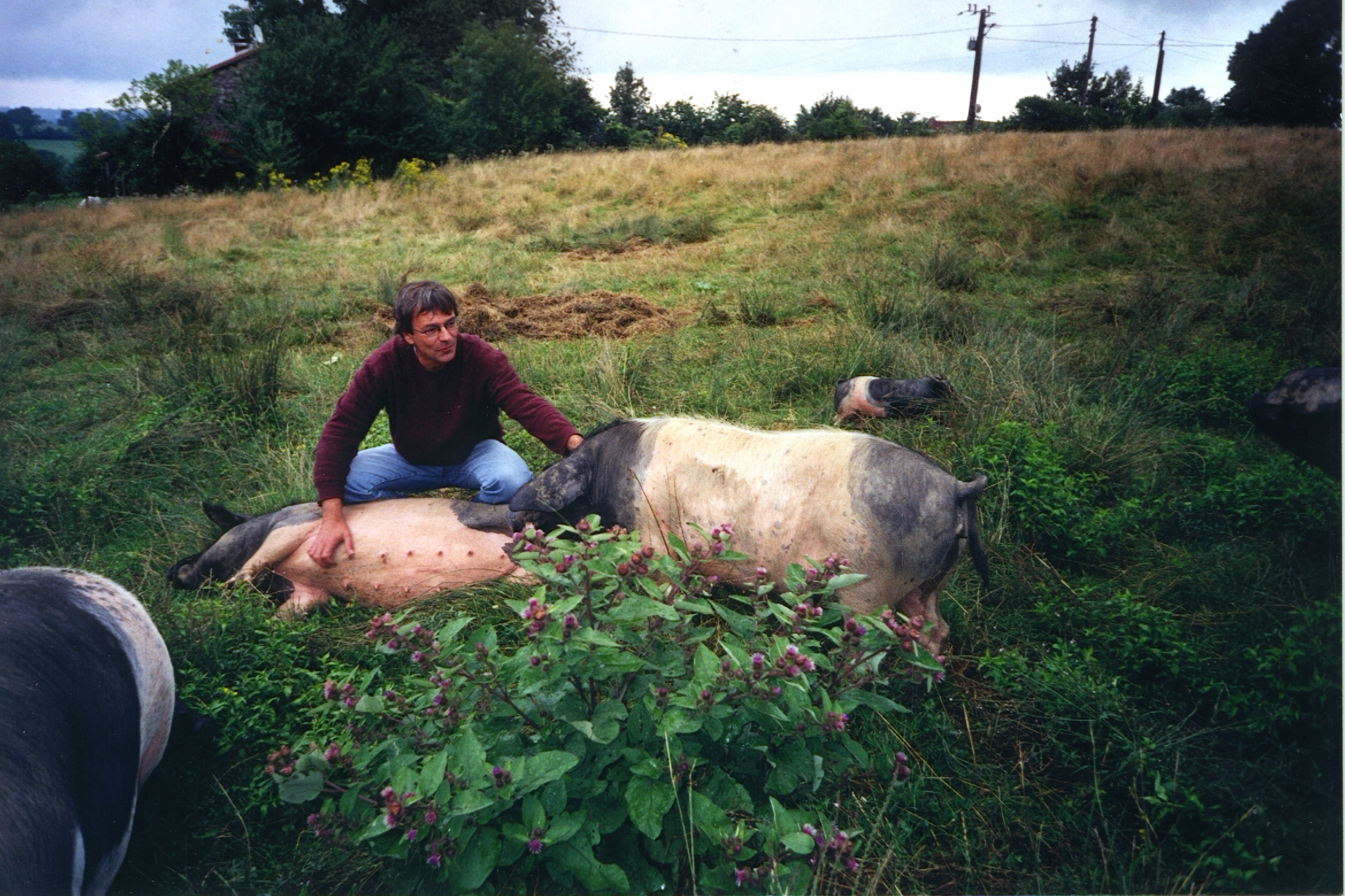 Photo Libre de droit par FH 25 décembre 2005 à 12:22 (CET)